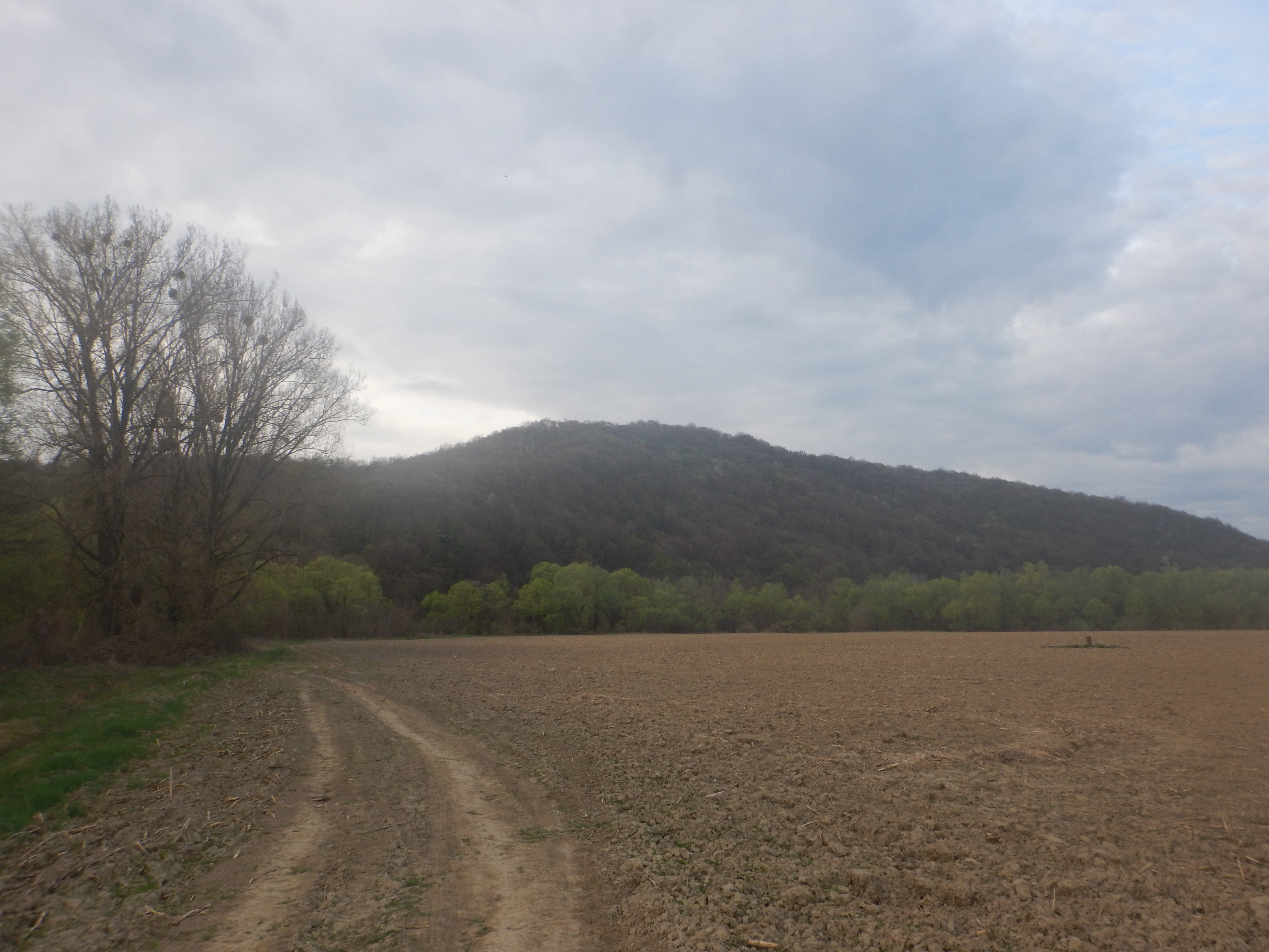 Vrch Drieňová